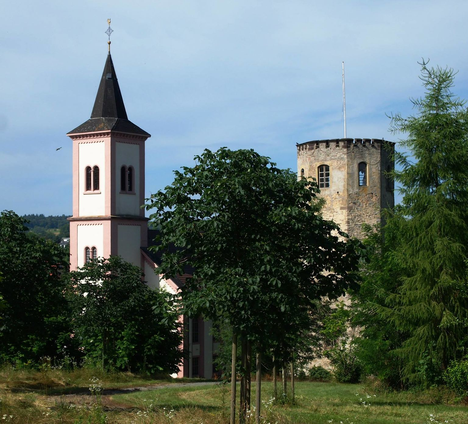 Kirchturm und Alter Turm beim Schloss Gondelsheim